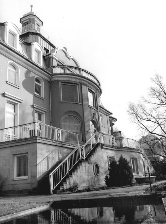 ADN-ZB-Deutsche Demokratische Republik-1-90-April 1990- Forschungsinstitut Manfred von Ardenne. In diesem Haus auf dem Weißen Hirsch in Dresden, Zeppelinstr. 7, arbeitet und wohnt Prof. Dr. h. c. multi. Manfred von Ardenne, Direktor des gleichnamigen Forschungsinstituts. Hier befinden sich sein Sekretariat, das Arbeitszimmer, die Bibliothek und medizinische Laborräume. Rechts im Hintergrund die Sternwarte mit einer 7-Meter-Kuppel, in der sich ein 25-Zentimeter-Refraktor befindet, der wissenschaftlichen Arbeiten dient. Reporter: Häßler Copyright: ADN-Zentralbild